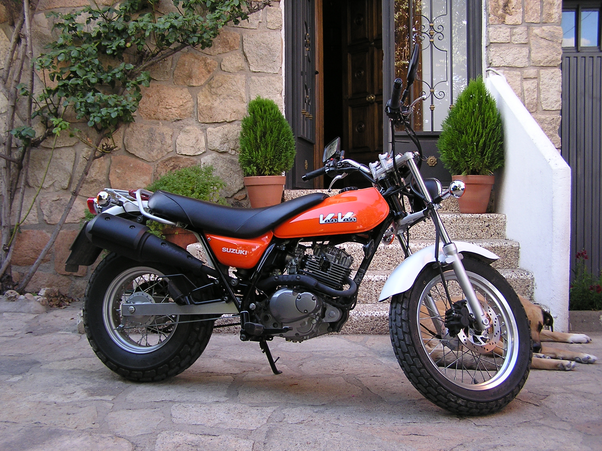 suzuki van van